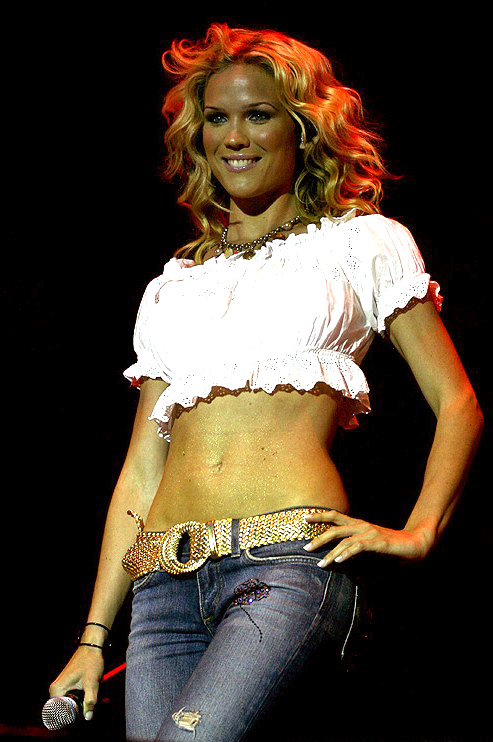 Marie @ Gatufesten in Sundsvall, Sweden. July 2006.